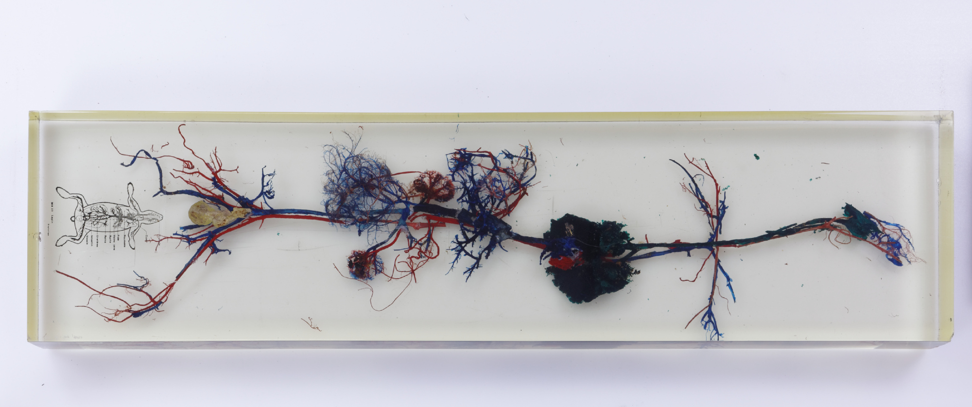 collection de l'Université Pierre-et-Marie-Curie à Paris.